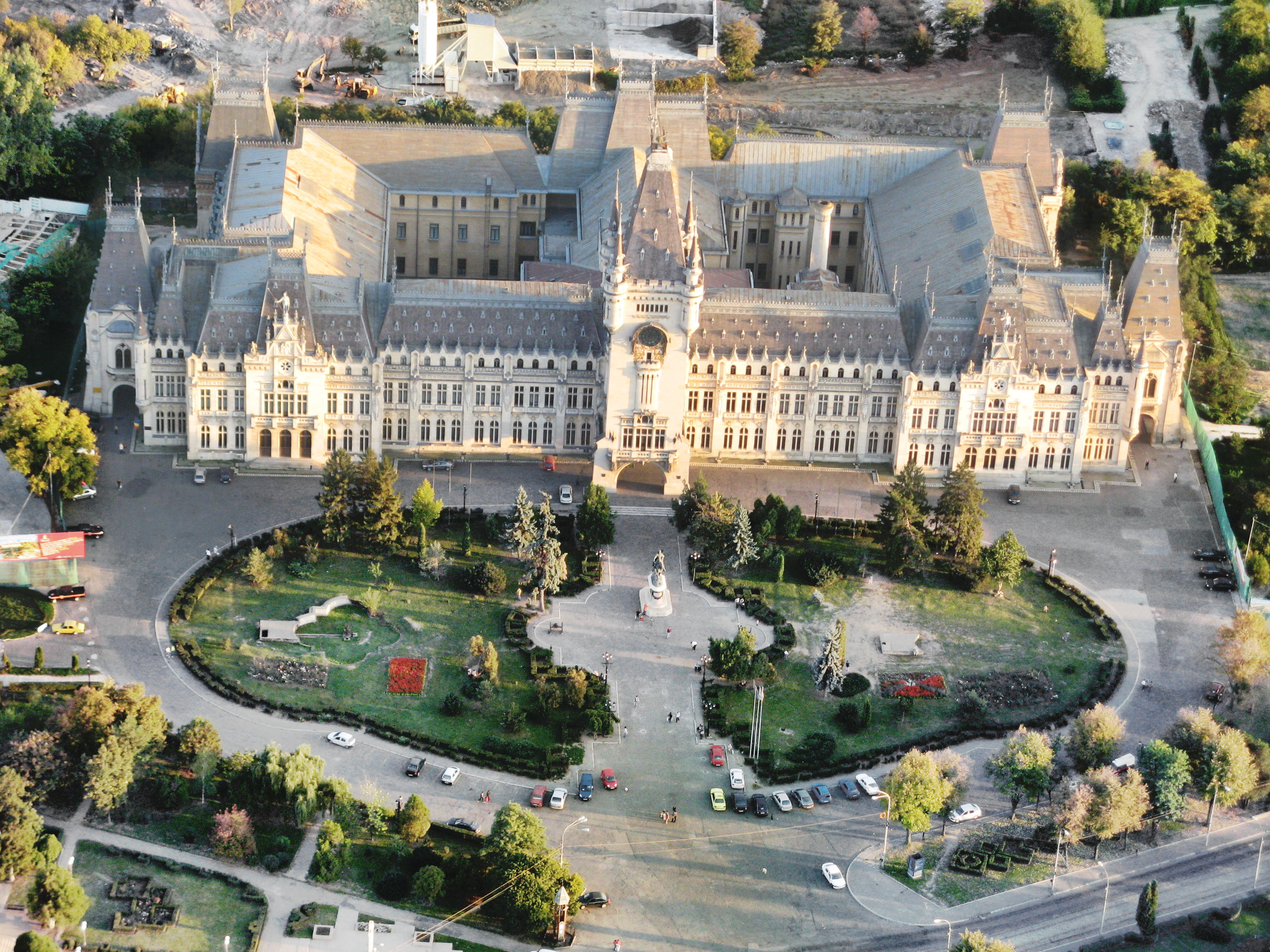 The Iaşi Palace of Culture. 01